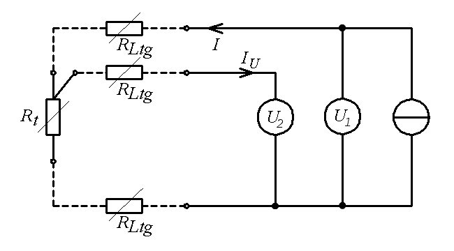 Vierleitermessung